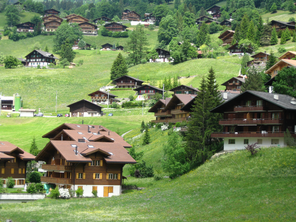 Grindelwald, bernese oberland.